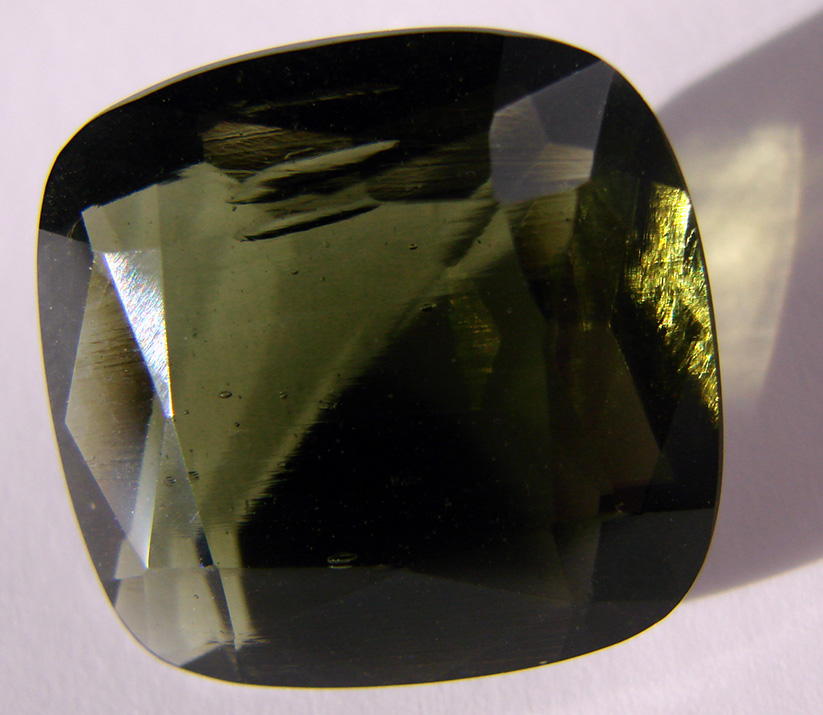 Cut moldavite